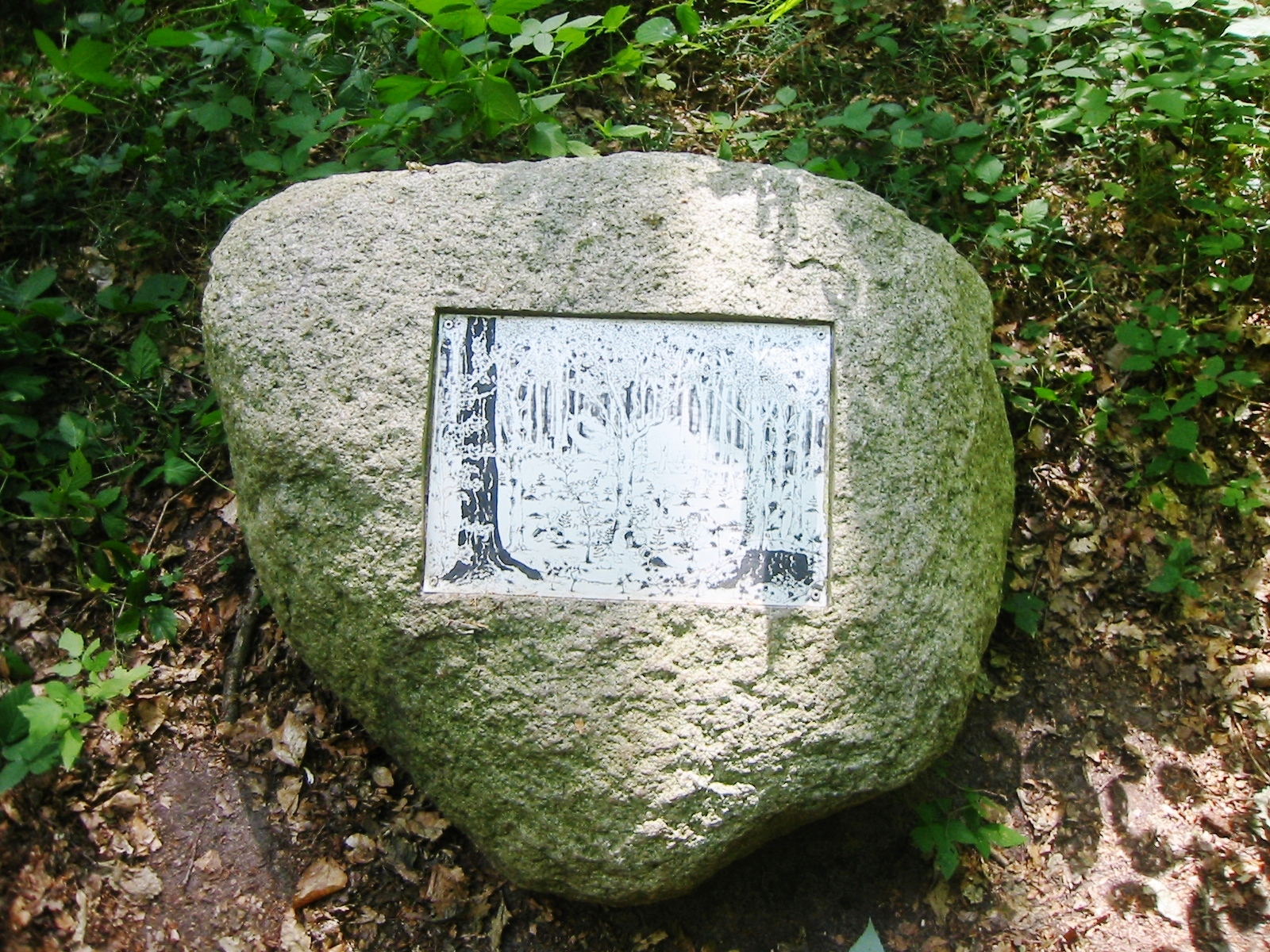 Im Naturschutzgebiet befindet sich ein Lehrpfad "Drachenreich Lanken". Mit Hilfe von Bild- und Objektinstallationen sollen insbesondere Kinder dazu animiert werden, Naturphänomene zu erkennen und zu beschreiben.